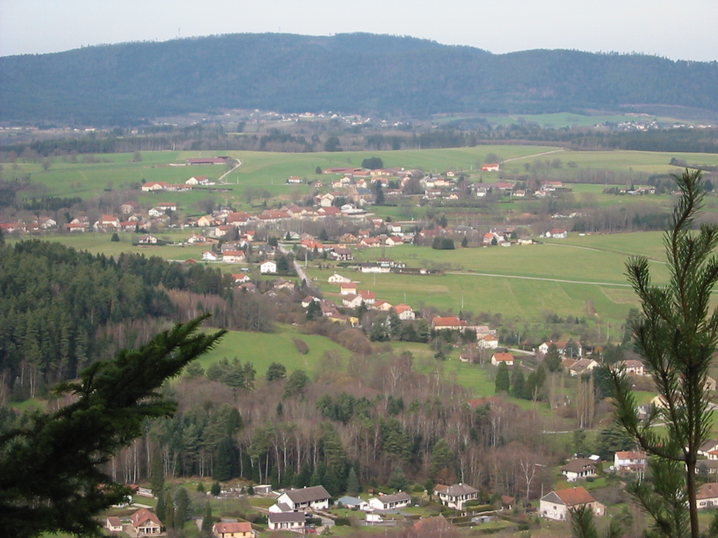 Nompatelize, commune des Vosges, vue de la roche du Chemont (576 m)